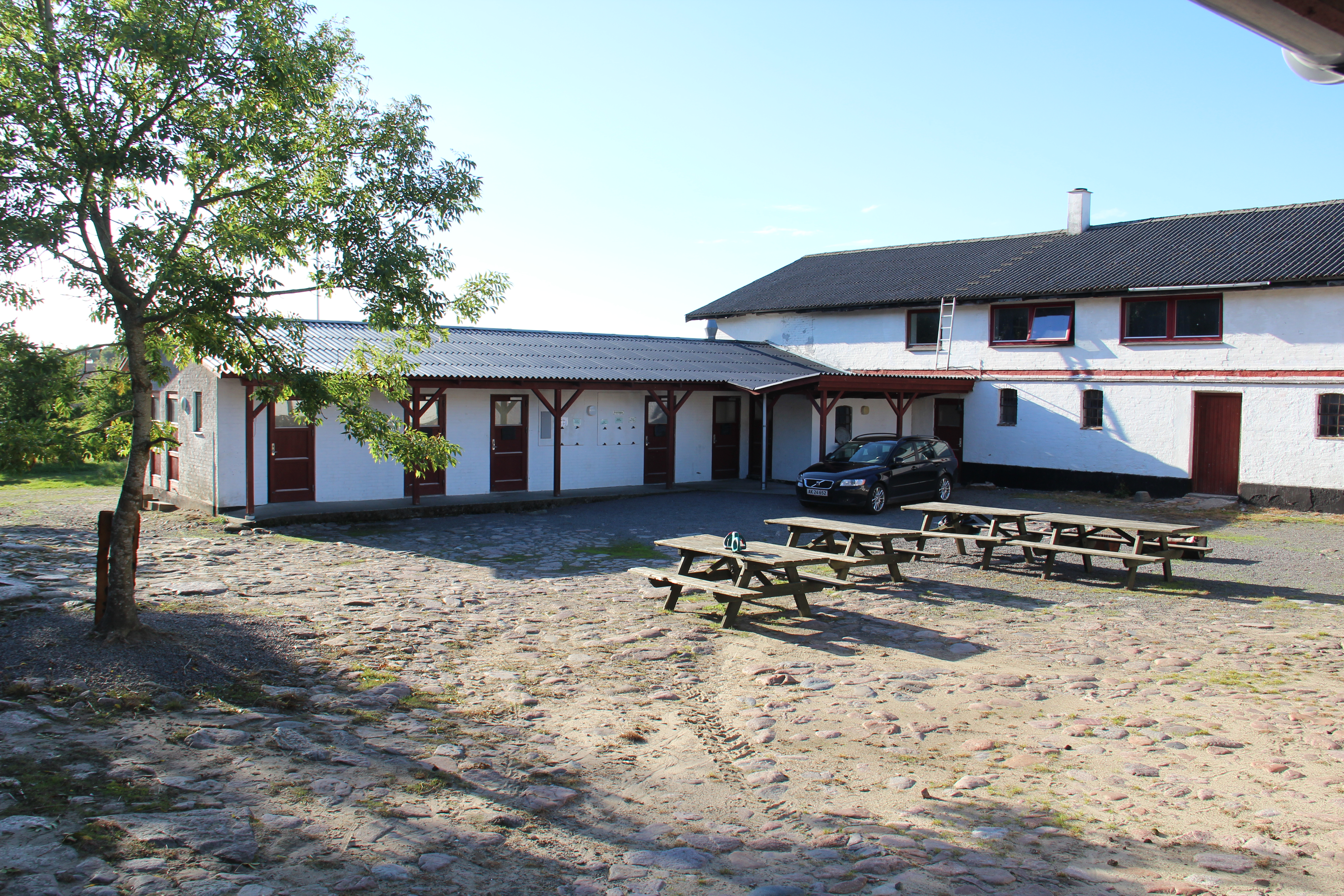 Rømeregårds vest og nordlænge